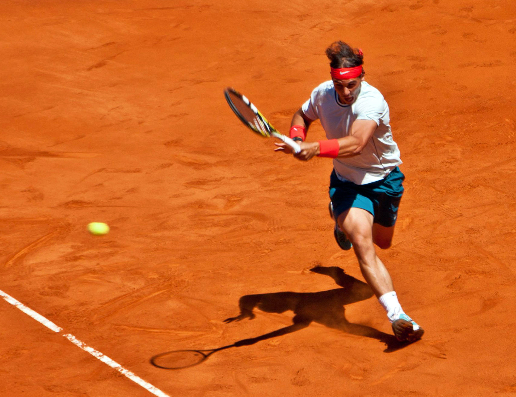 2013 Mutua Madrid Open - Rafael Nadal vs Pablo Andújar (semifinals)